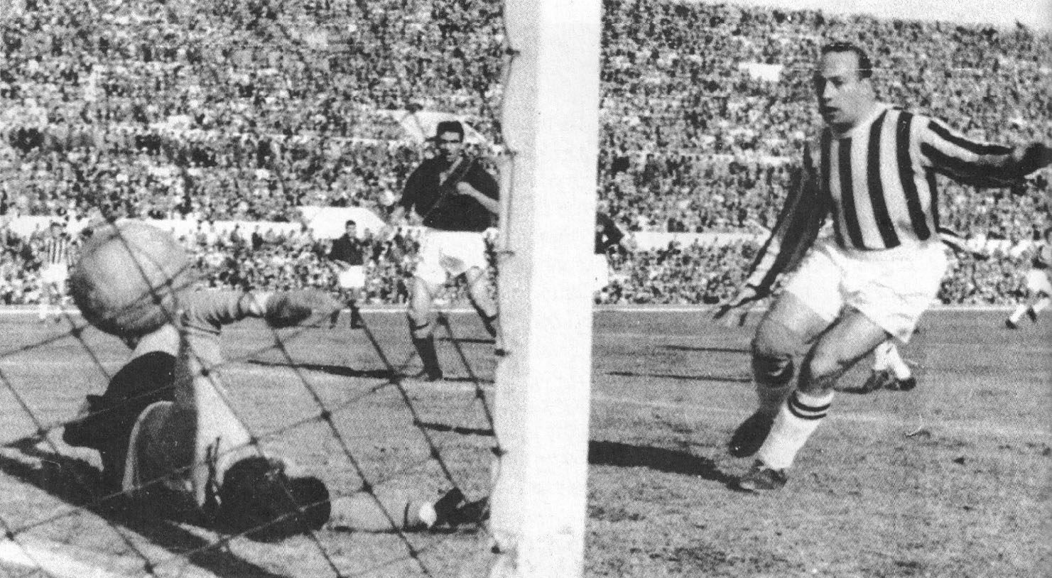 Roma, stadio dei Centomila, 25 aprile 1954. Il calciatore juventino Eduardo Ricagni (a sinistra) guarda il pallone scagliato dal compagno di squadra Ermes Muccinelli (fuori quadro) battere il portiere romanista Giuseppe "Bepi" Moro (a destra), per il gol del definitivo pareggio nella sfida tra Roma e Juventus (1-1) valevole per la 29ª giornata del campionato italiano di Serie A 1953-54.